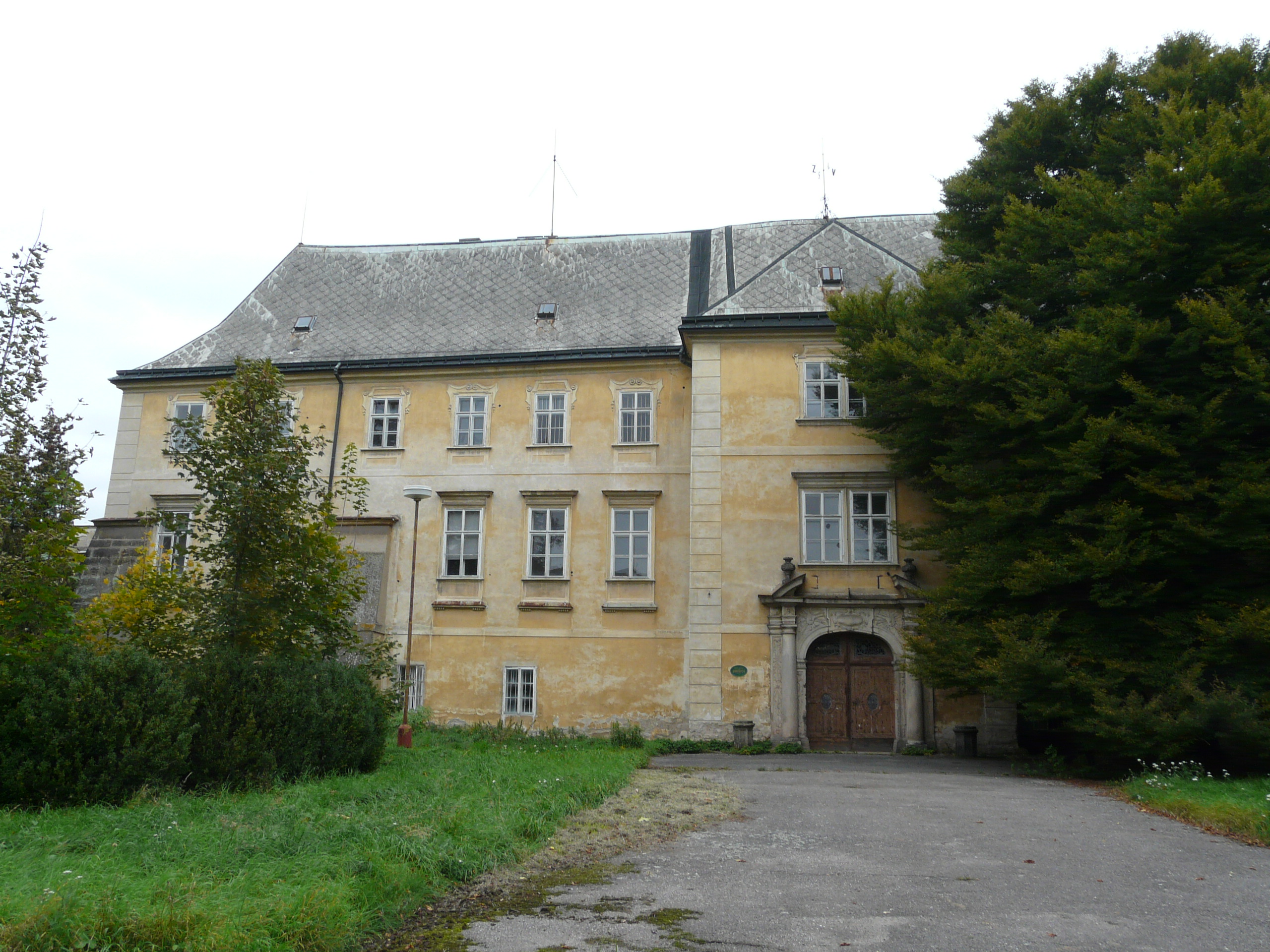 Zámek Smiřice, Smiřice 130